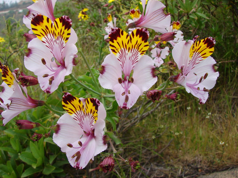 Quebrada El Tigre